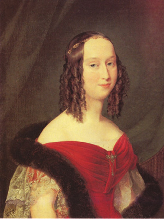 Bildnis der Großherzogin Cäcilie von Oldenburg